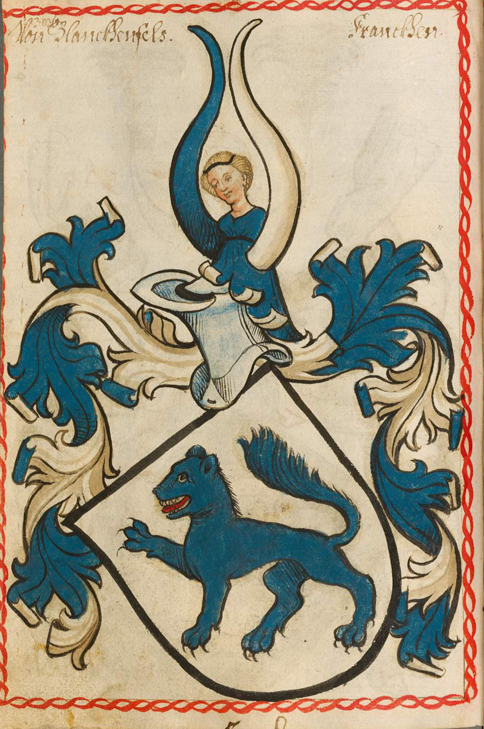 Scheibler'sches Wappenbuch, älterer Teil Von Blanckhenfels Franckhen Wappen der Familie von Plankenfels.